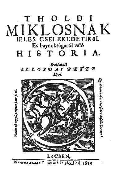 Ilosvai Selymes Péter: Tholdi Miklósnak jeles cselekedeteiről (Lőcse, 1620)